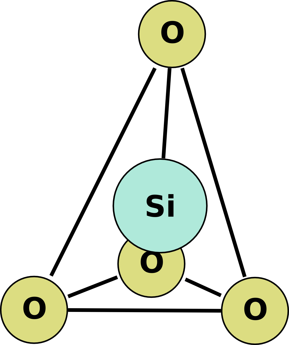 zelf, gebaseerd op werk van Gebruiker:Torero